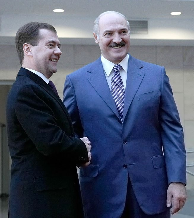 С Президентом Белоруссии Александром Лукашенко.